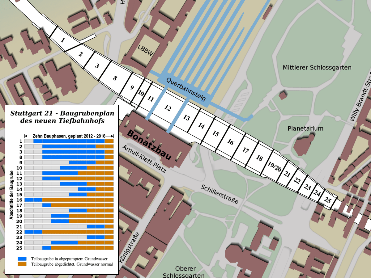 Projekt Stuttgart 21 - Grafik zur Illustration der Bauphasen, die zum Bau des tiefergelegten Durchgangsbahnhofs in Stuttgart geplant sind.